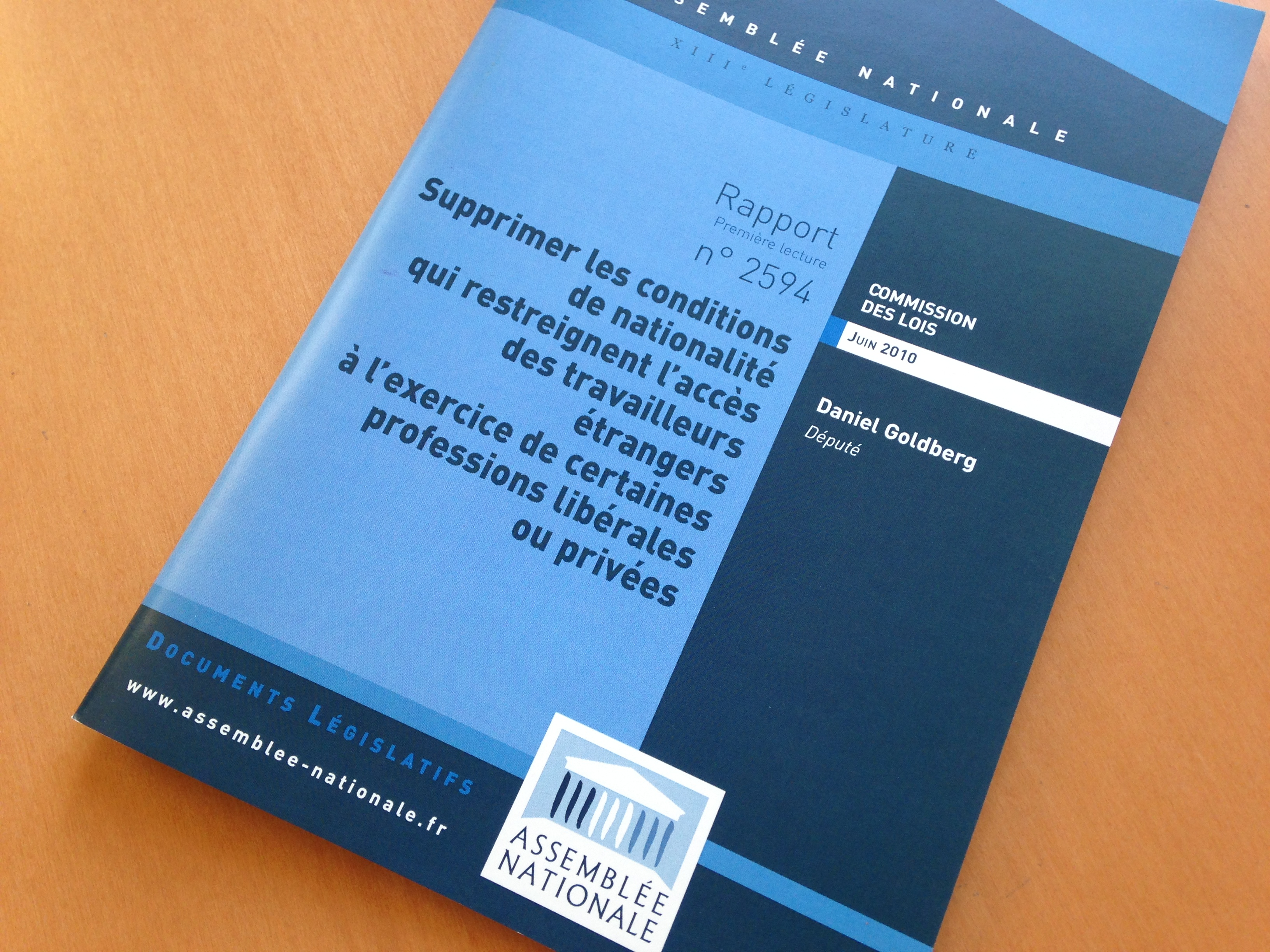 Rapport de la Commission des lois de Daniel Goldberg sur la proposition de loi 2594 sur les conditions de nationalité posées à l'accès de certains métiers (juin 2010)